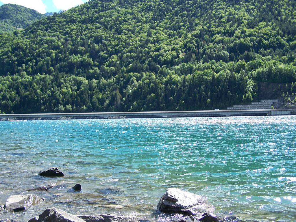 barrage du Verney